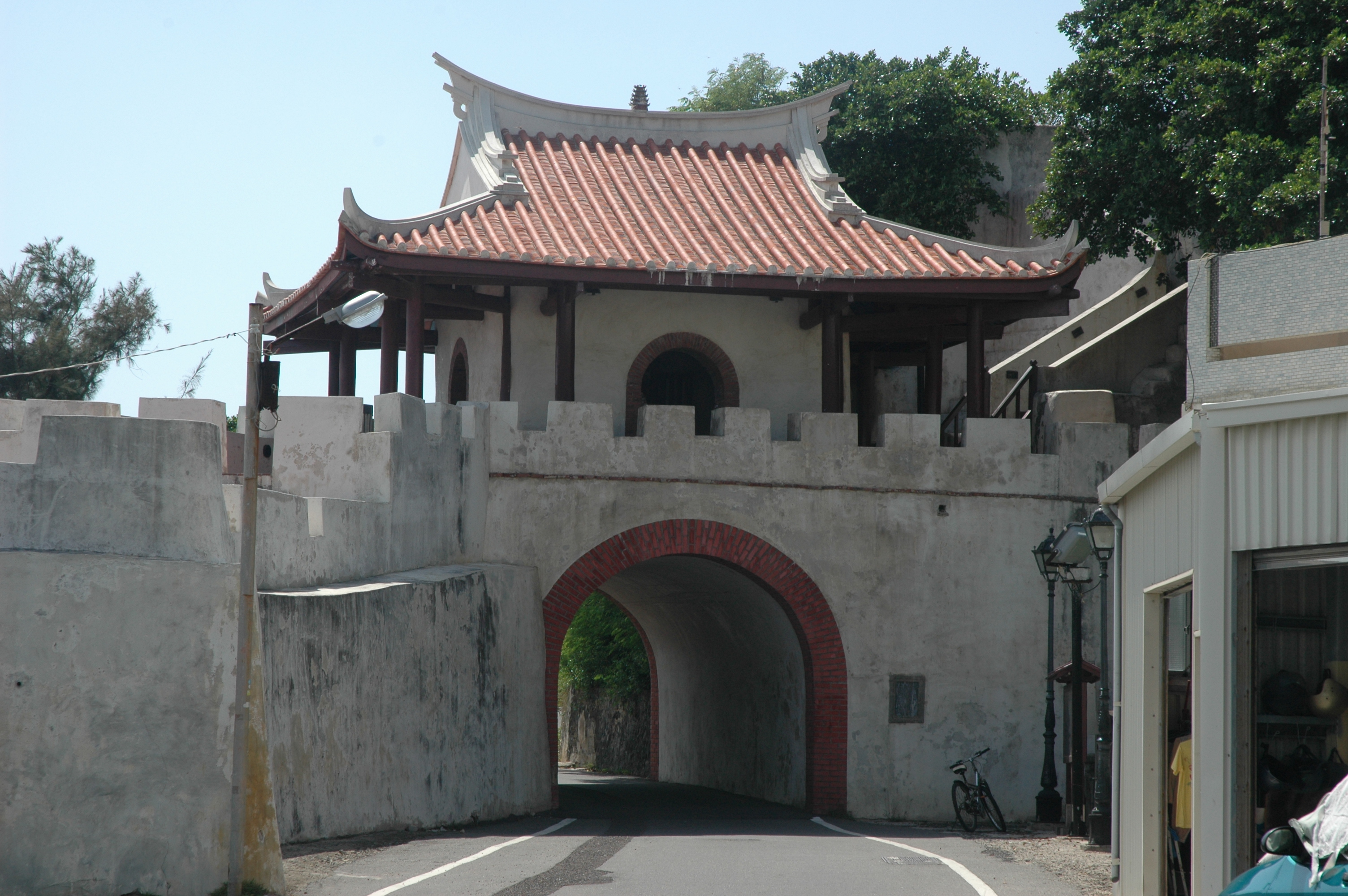 中文（台灣）: 澎湖縣文化資產1